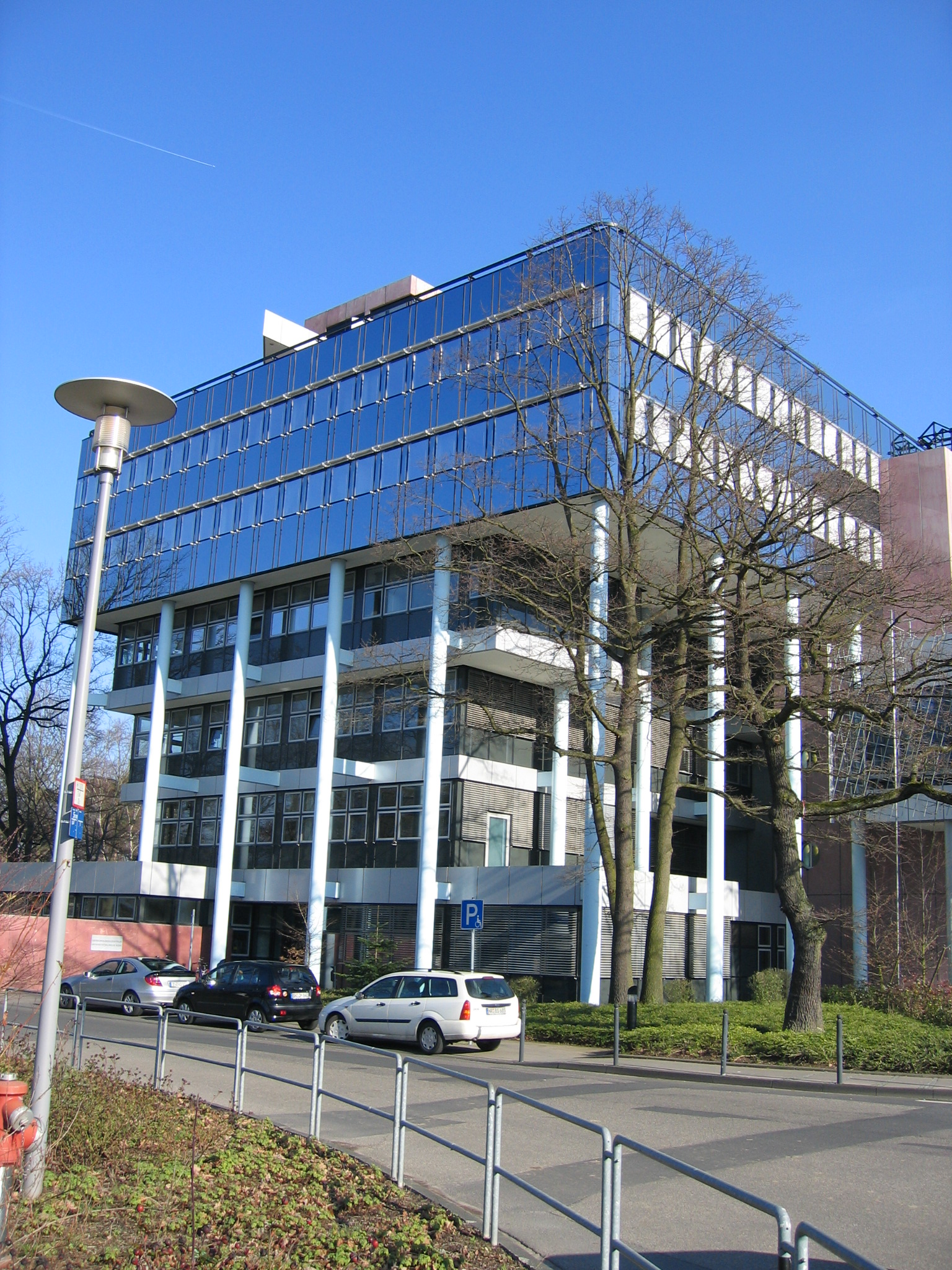 Universitätsklinikum Bonn, Bonn-Venusberg